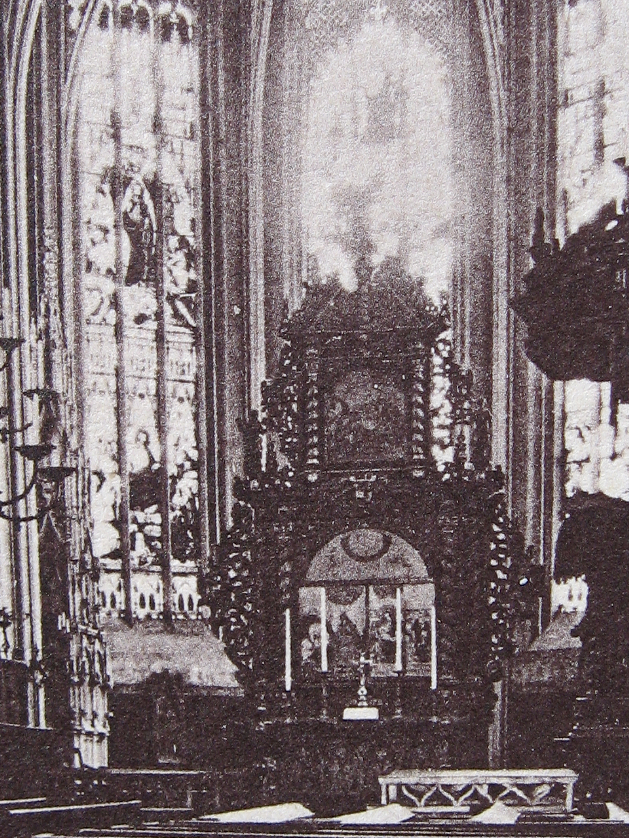 Marienkirche Dortmund 1890, Barockaltar aus dem Jahr 1720 mit zerschnittenem Marienaltar